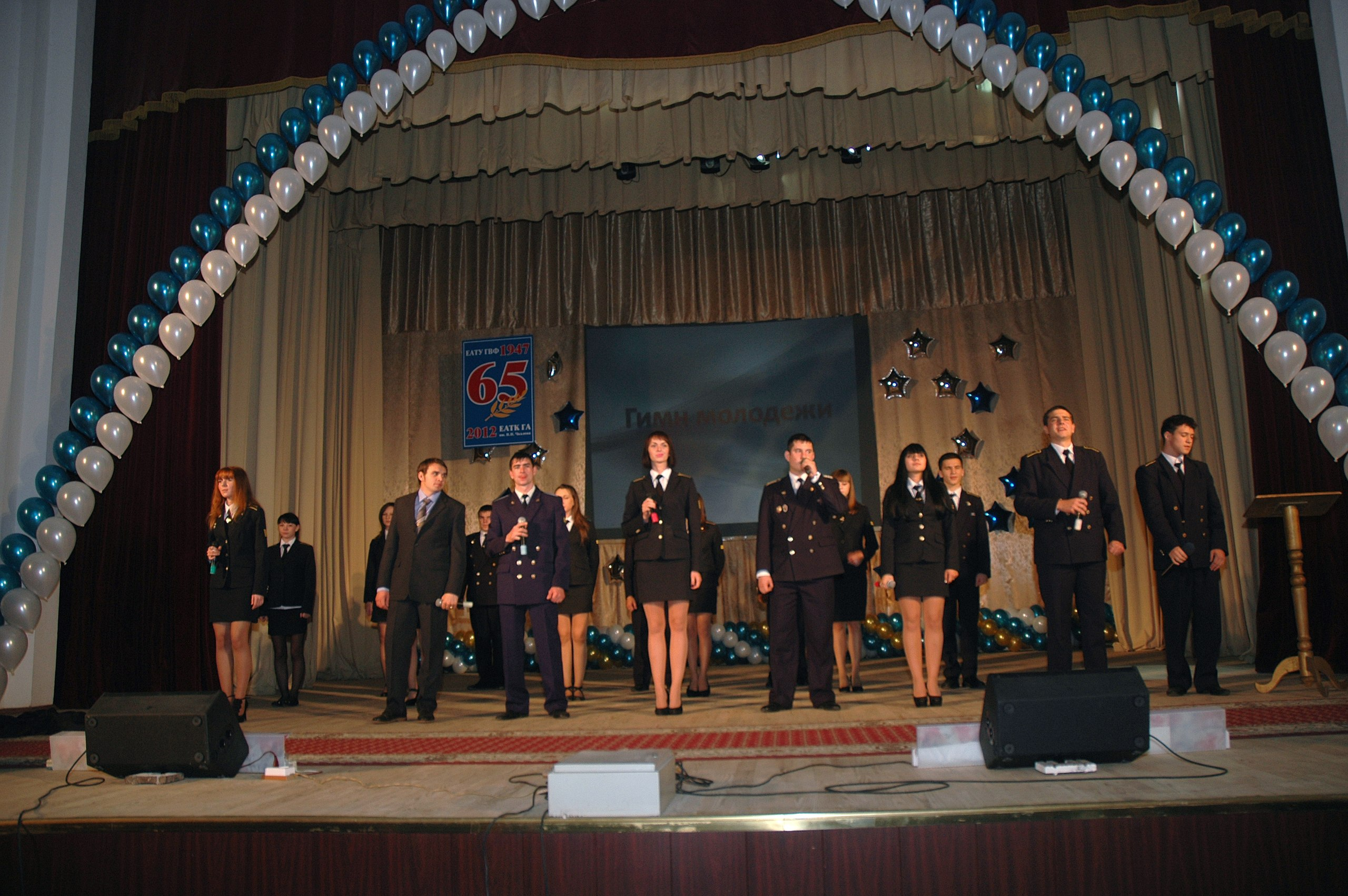 Курсанты и выпускники поздравляют с юбилеем -песней